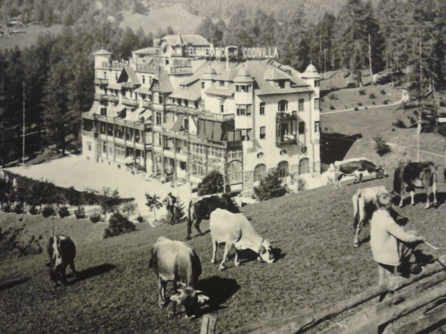 Istituto Elioterapico Codivilla, Cioni-Bertoli Barsotti, "The Rizzoli Orthopaedic Institute in San Michele in Bosco", Istituti Ortopedici Rizzoli, 1996, 287 pagine, p. 136